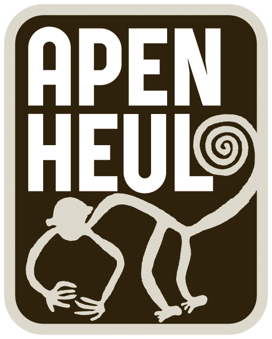 logo Apenheul